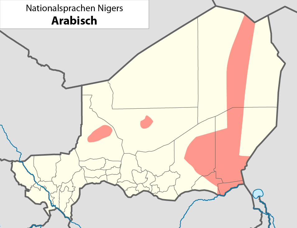 Nationalsprachen des NigerDie dargestellte Nationalsprache kann dem Dateinamen entnommen werden.